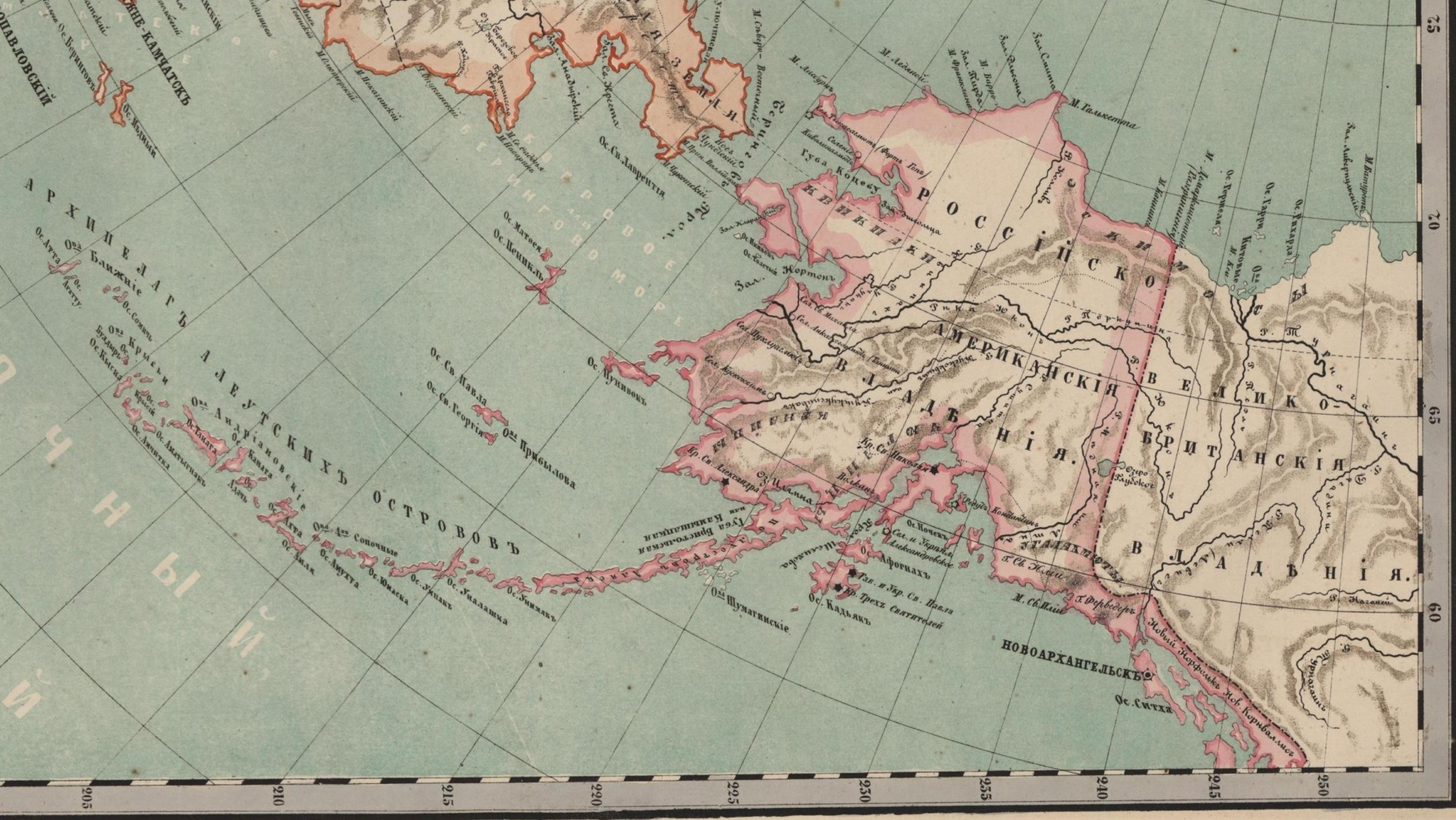 Русская Америка. Фрагмент из Генеральной карты России и Сибири на 1860 год.